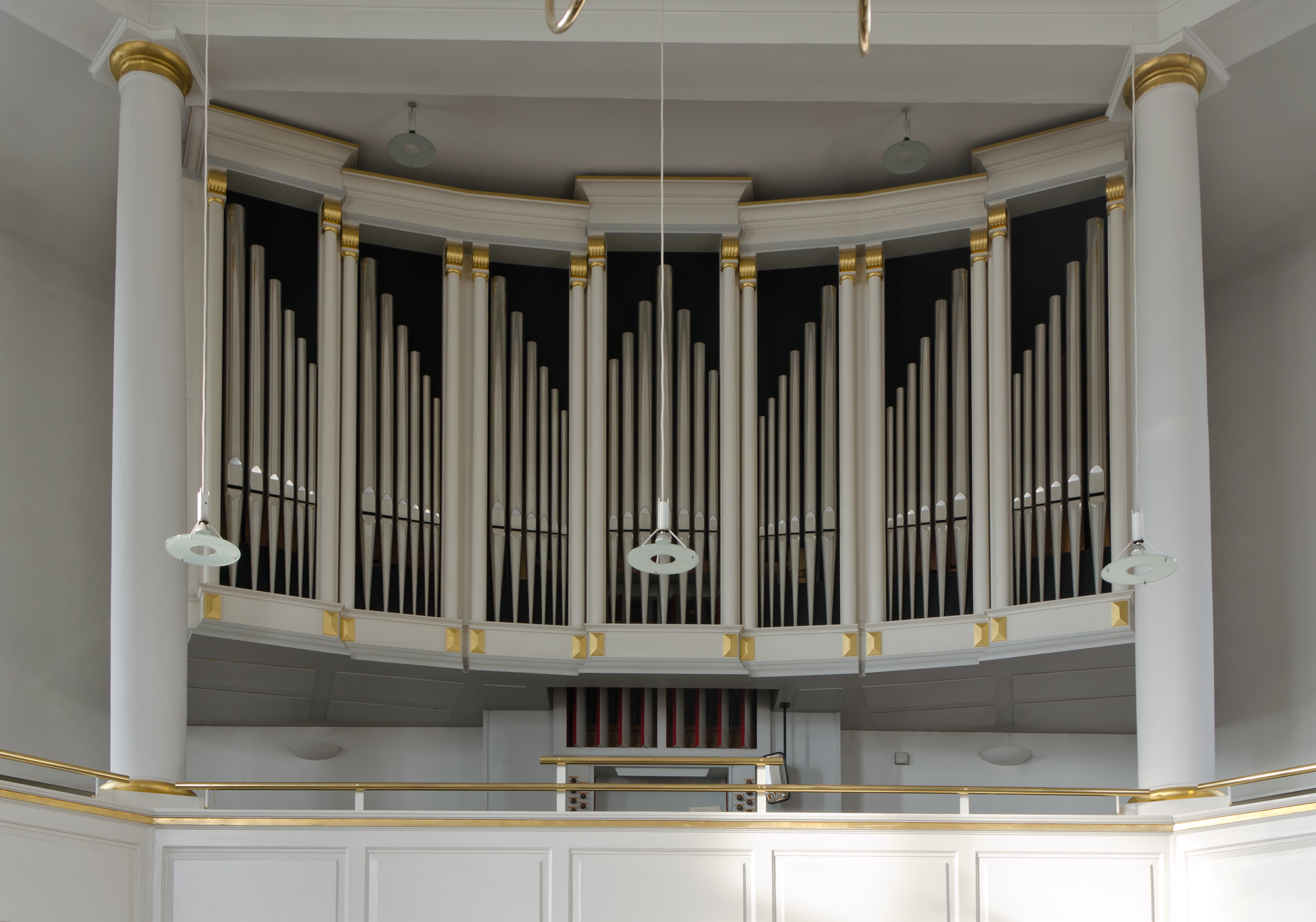 Osterkirche Bramfeld Orgel